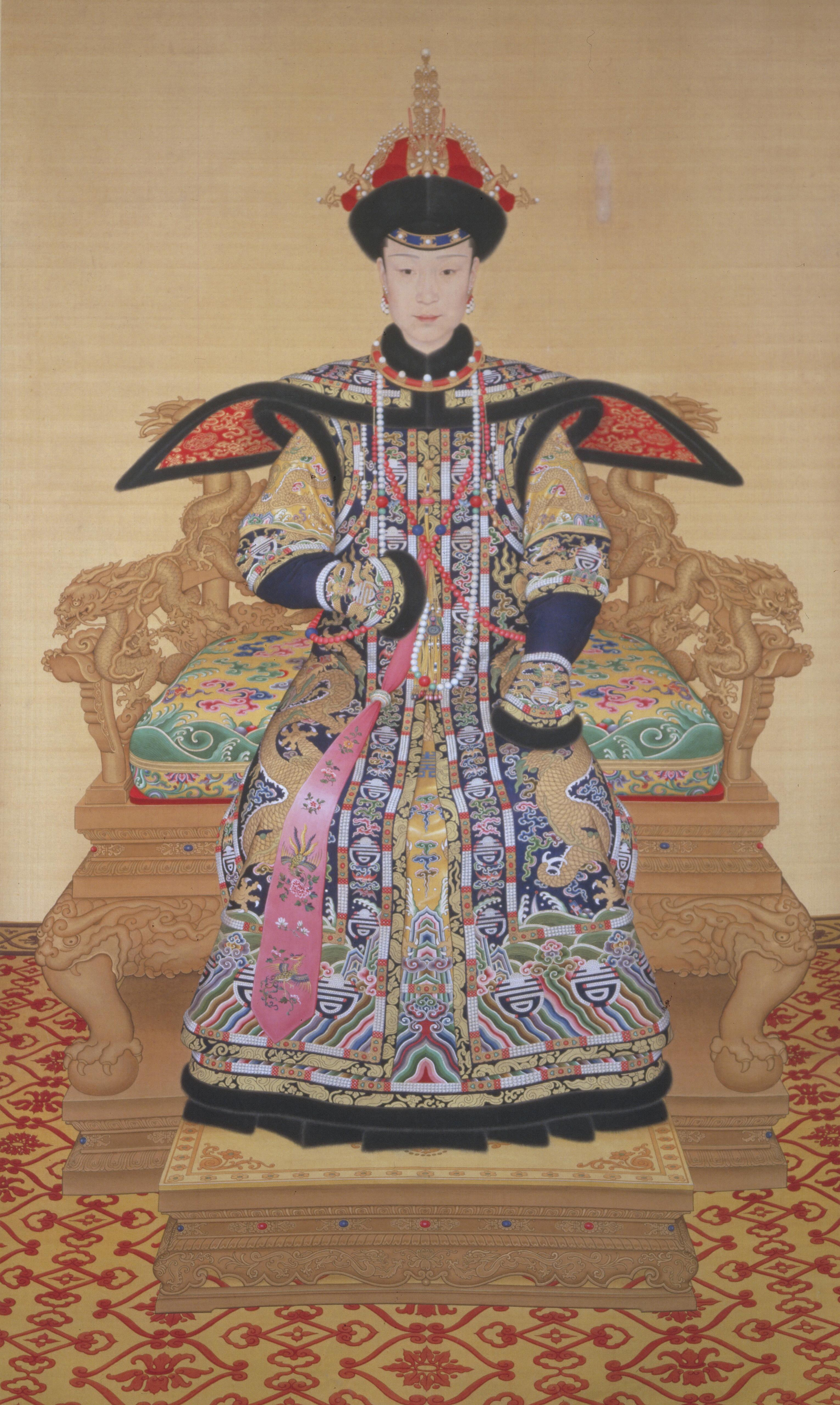 乾隆皇后肖像